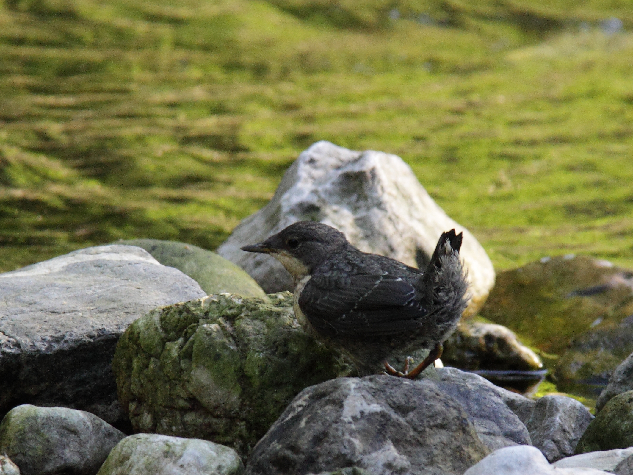 juvenil White-throated Dipper NE-Slovakia, Slovak Paradise (Slovak: Slovenský raj) National Park, vic Cingov (Hornad river), ca. 500m asl., 24.06.2012 IMG_1170